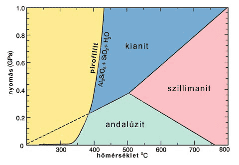 Az alumoszilikátok stabilitási tartományai a nyomás és hőmérséklet függvényében